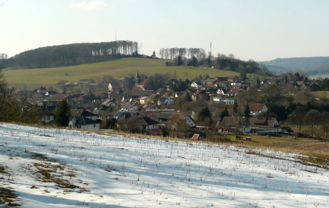 Holtensen